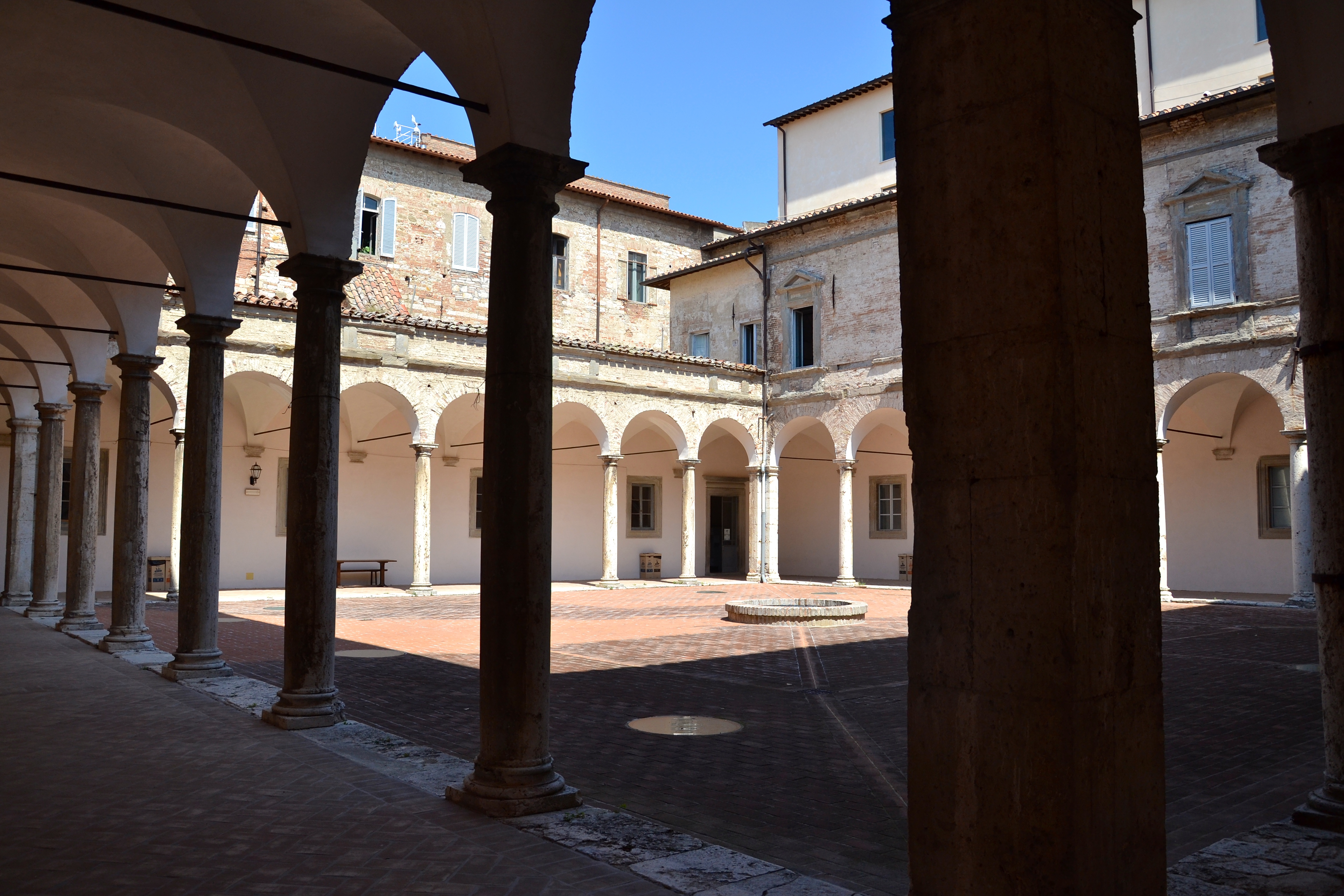 Chiostro delle stelle di san Pietro a Perugia